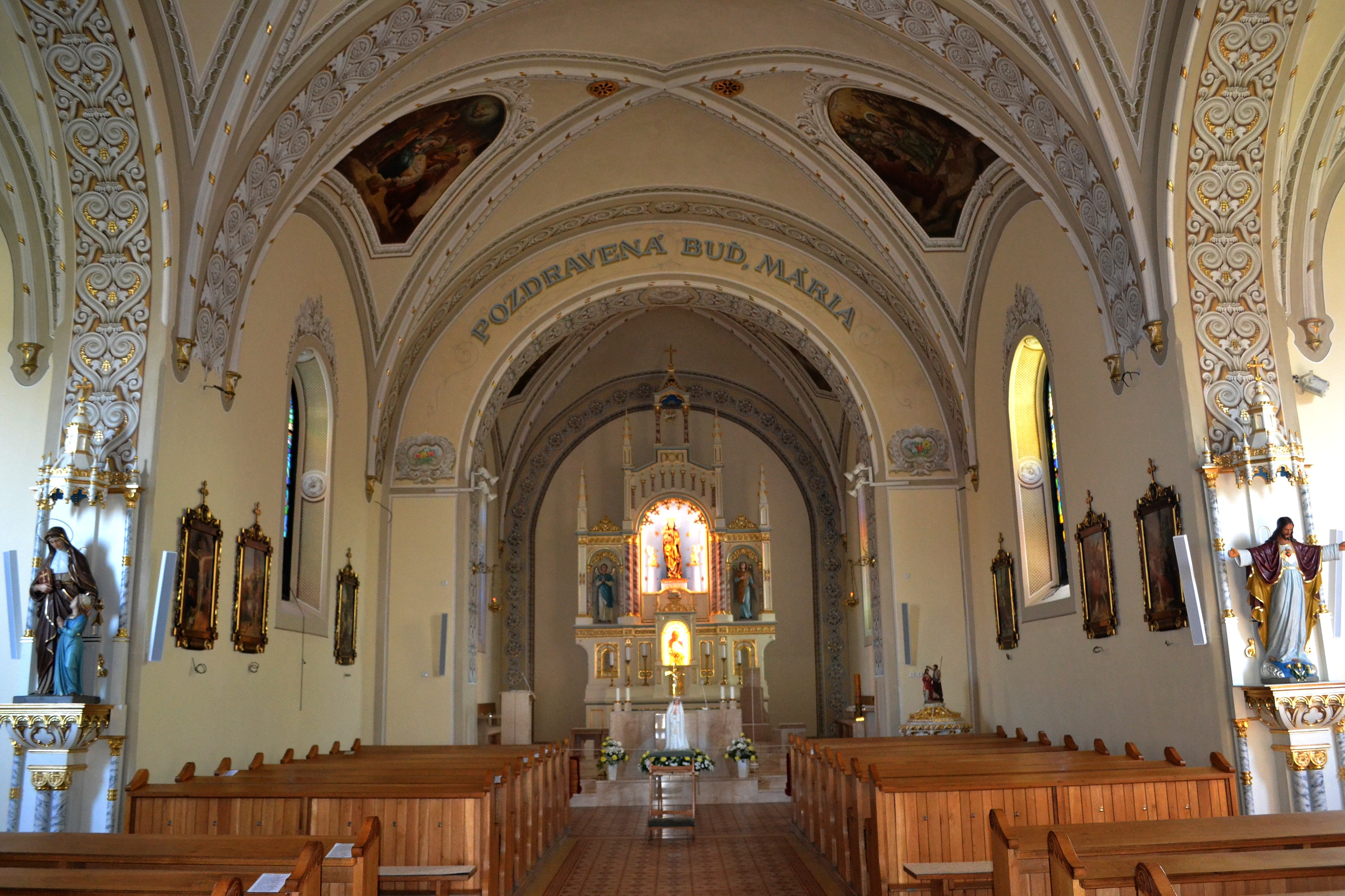 Rajecká Lesná (okr. Žilina), Bazilika Narodenia Panny Márie; pohľad do interiéru